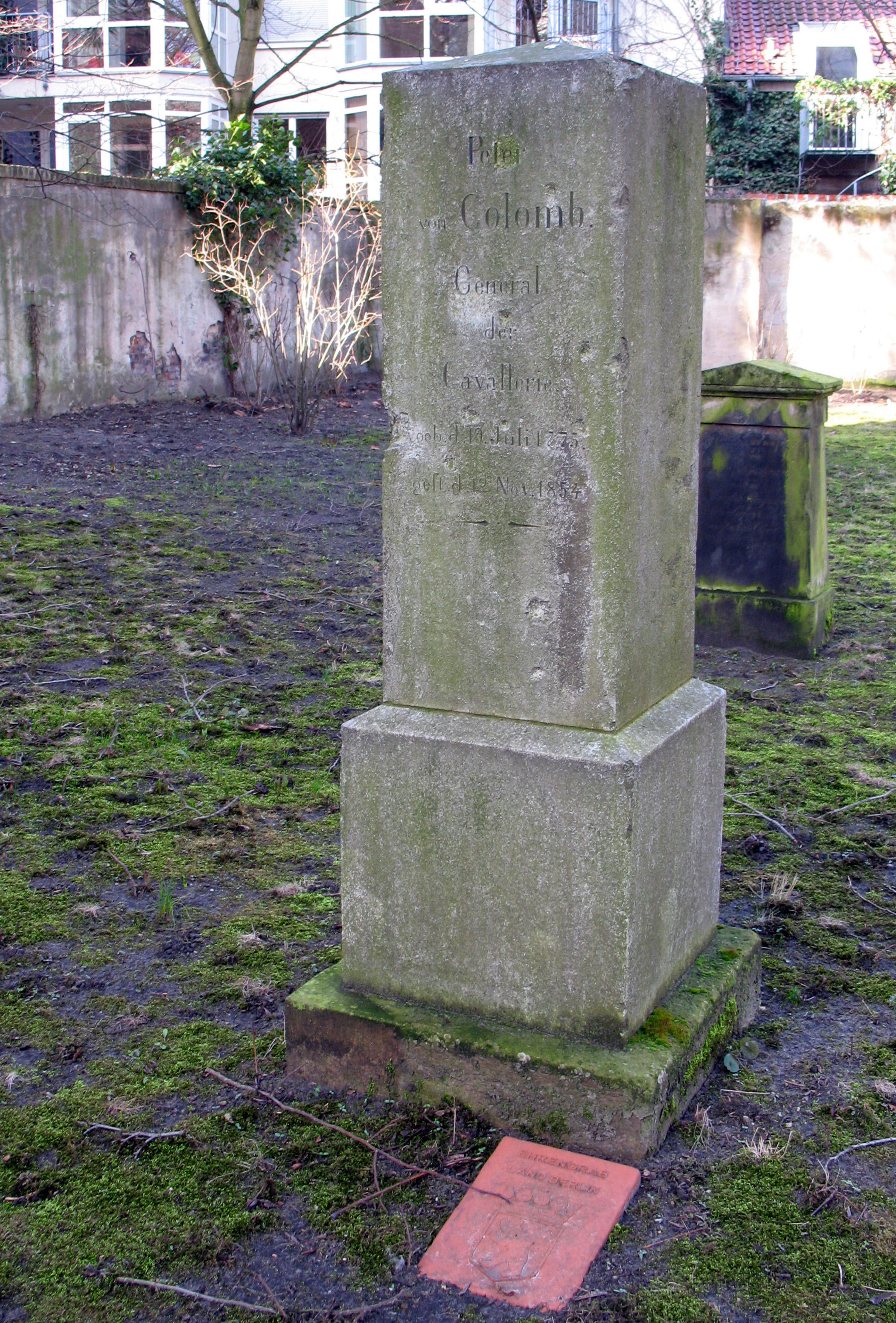 Grabstein: Peter von Colomb auf dem Alten Garnisonfriedhof in Berlin-Mitte